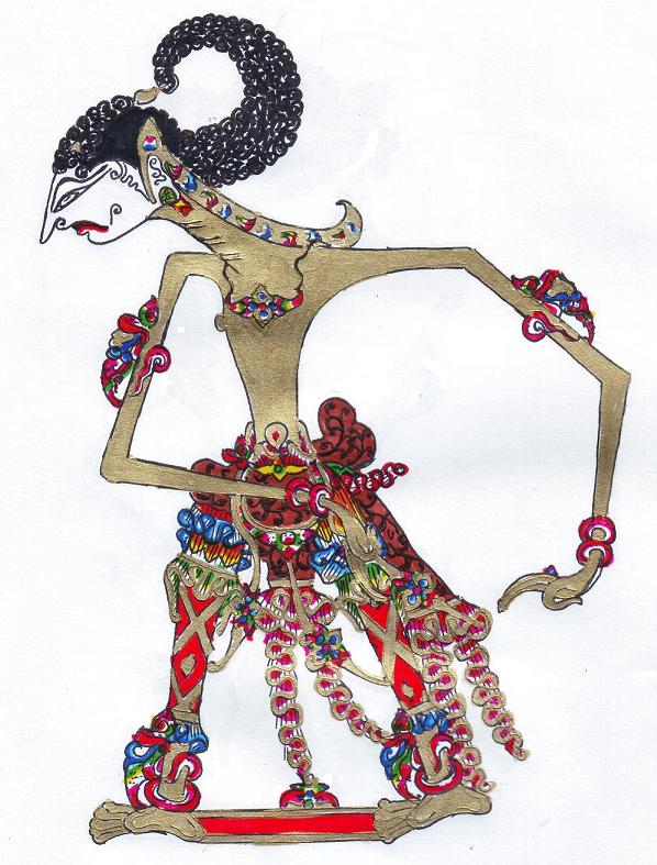 Wayang Irawan hasil lukisan sendiri di atas kertas HVS